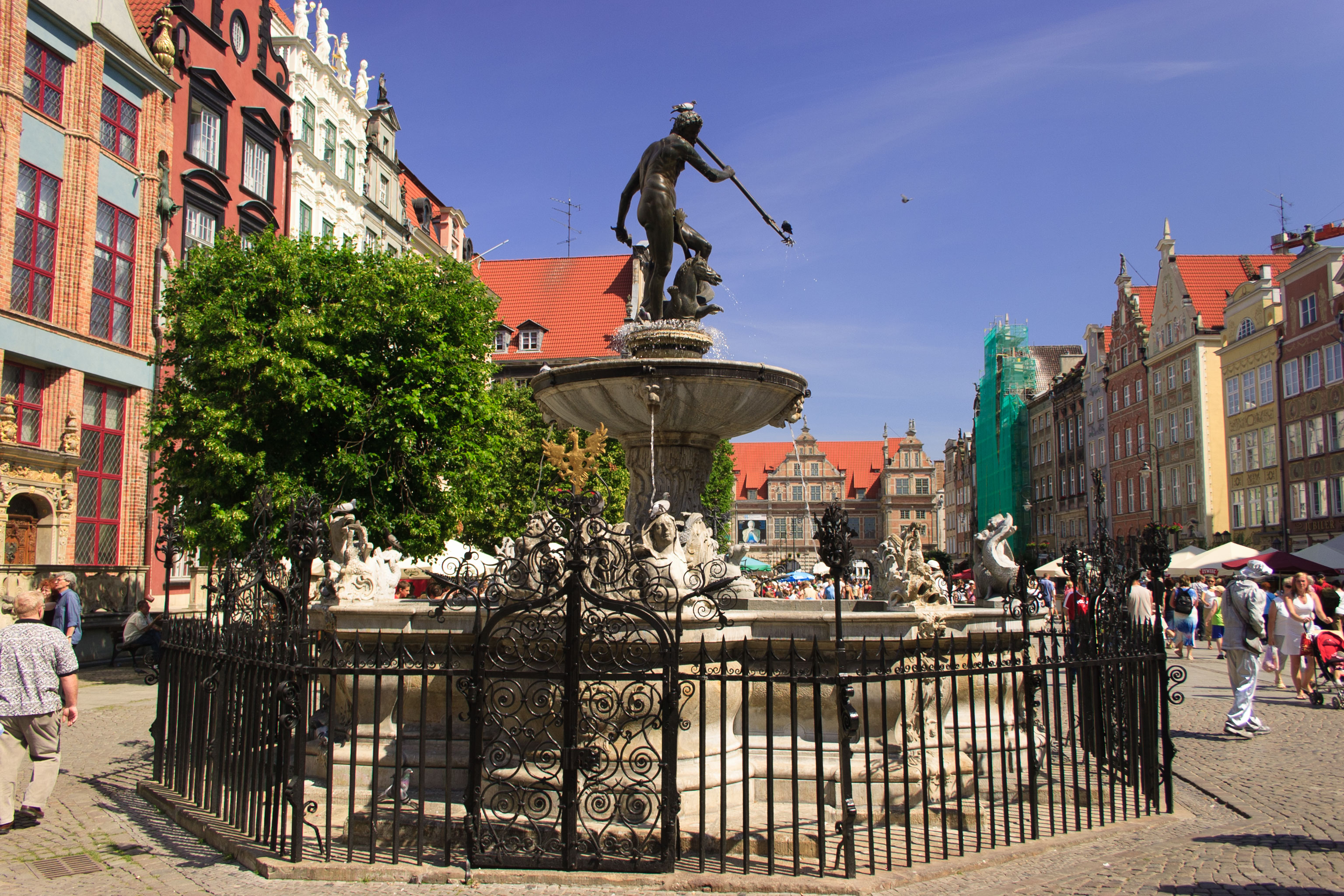 fontanna Neptuna ul. Długi Targ, Gdańsk